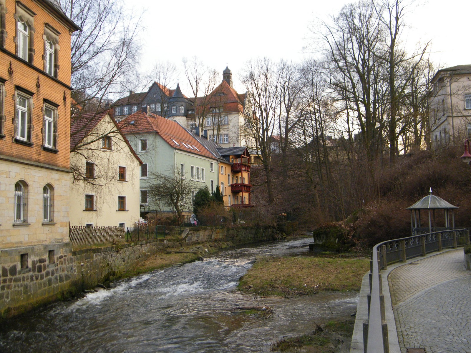 Fluss Sebnitz in Große Kreisstadt Sebnitz